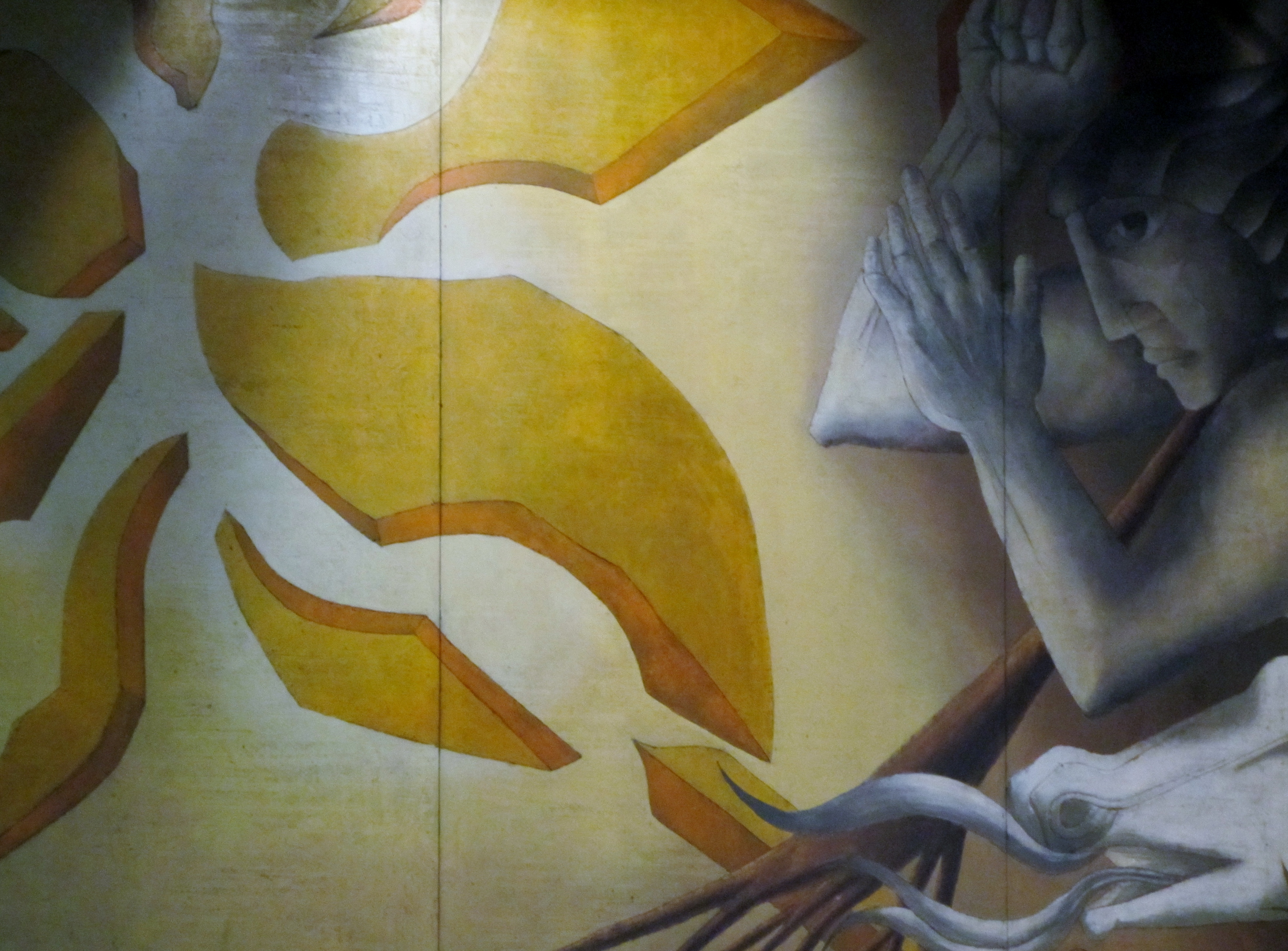 El encuentro, mural del pintor chileno Mario Toral que forma parte de la gran obra titulada Memoria visual de una nación, metro Universidad de Chile, en Santiago de Chile. Este panel está sobre el túnel oriente. El fragmento representa al dios de la guerra, que avanza con el puño alzado.